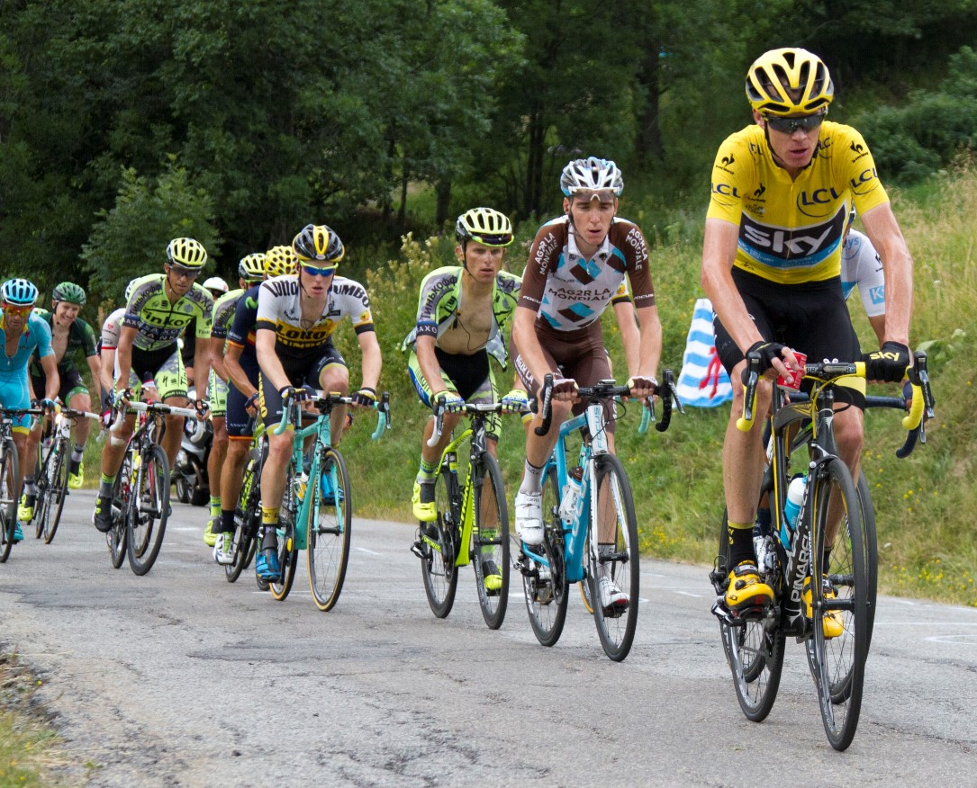 173 groep gele trui